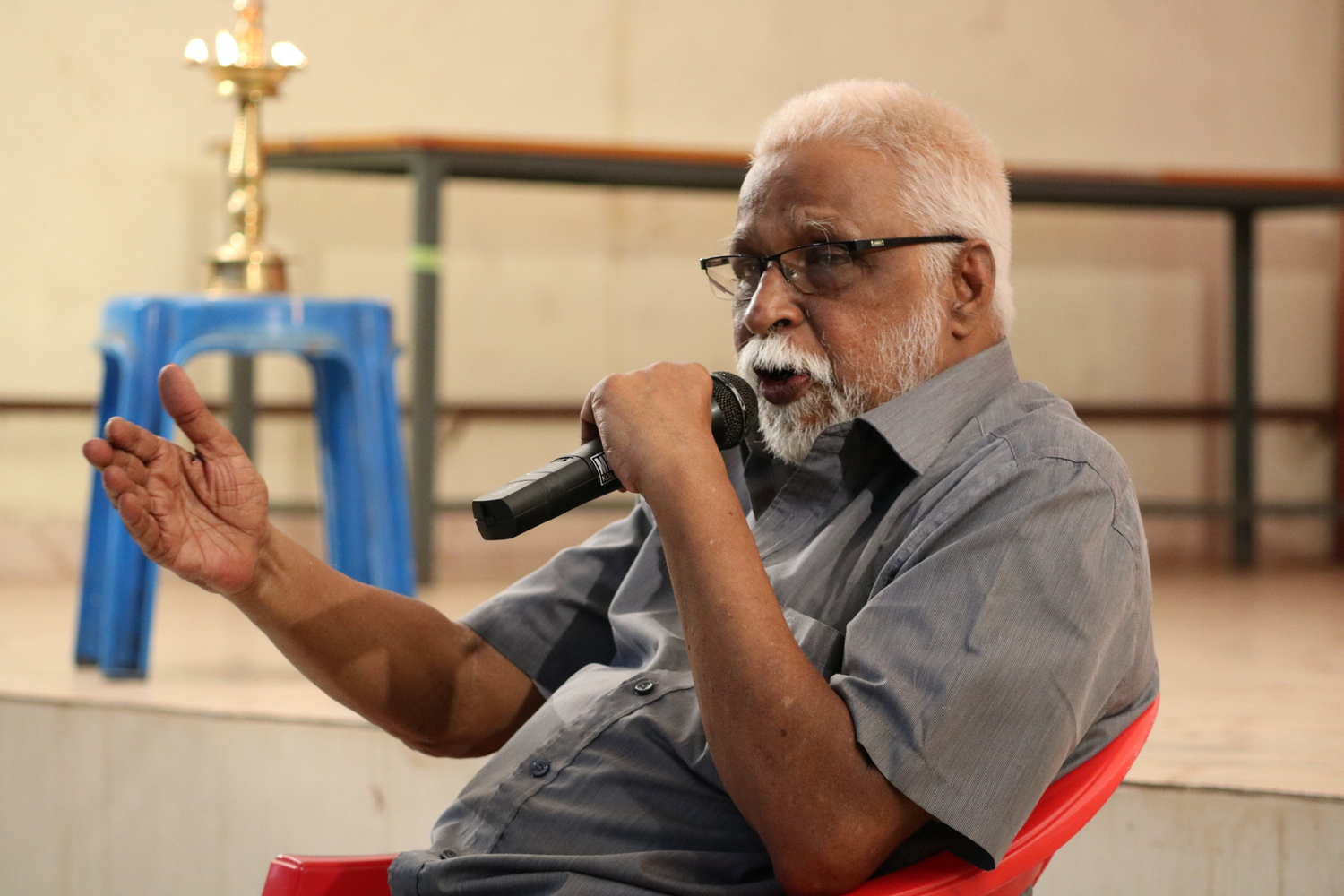 വി.കെ. ശശിധരന്‍ 2019 ഏപ്രിലില്‍ കൊല്ലത്ത്